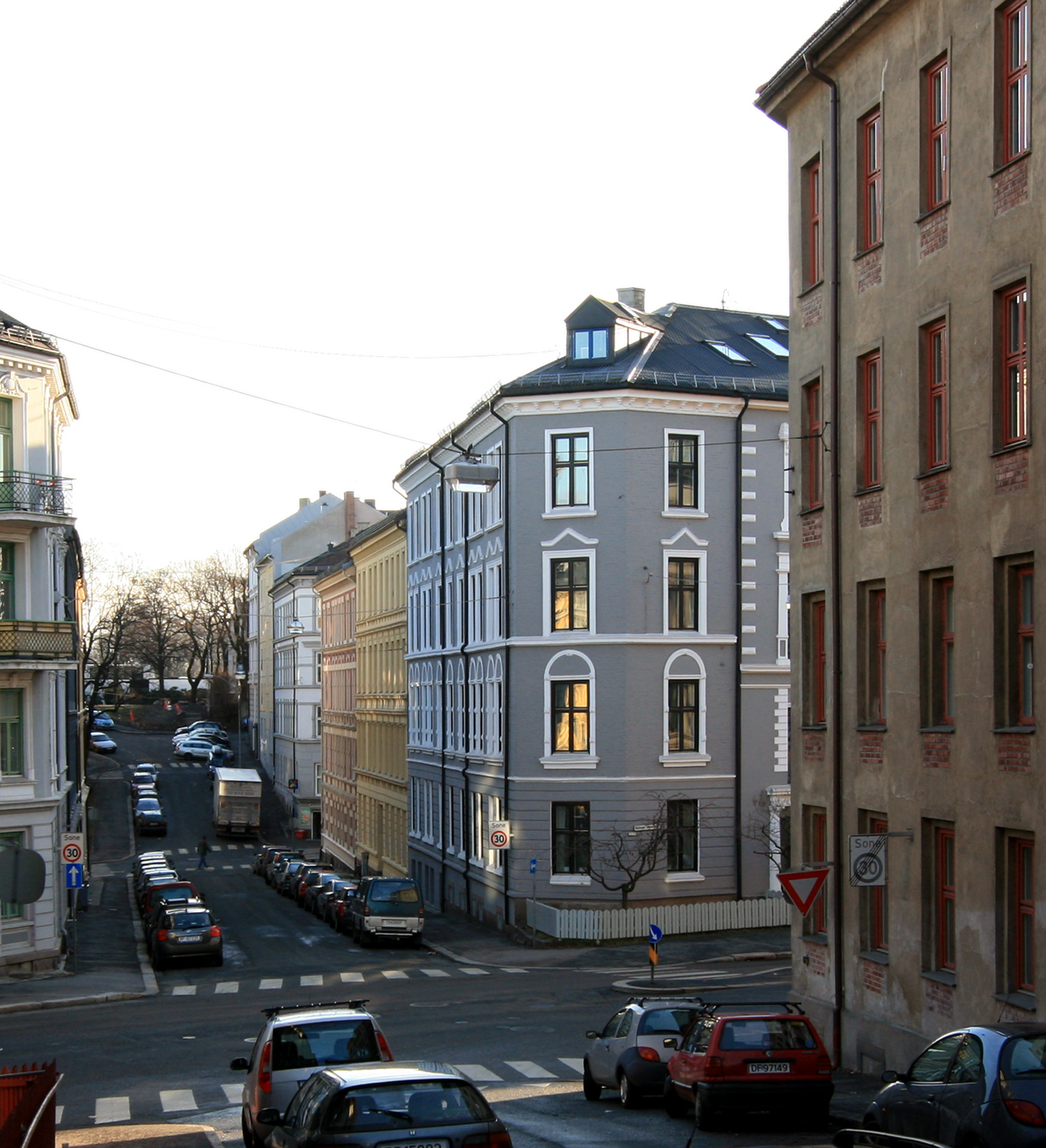 Bergstien, Oslo. Sett mot Akersbakken.